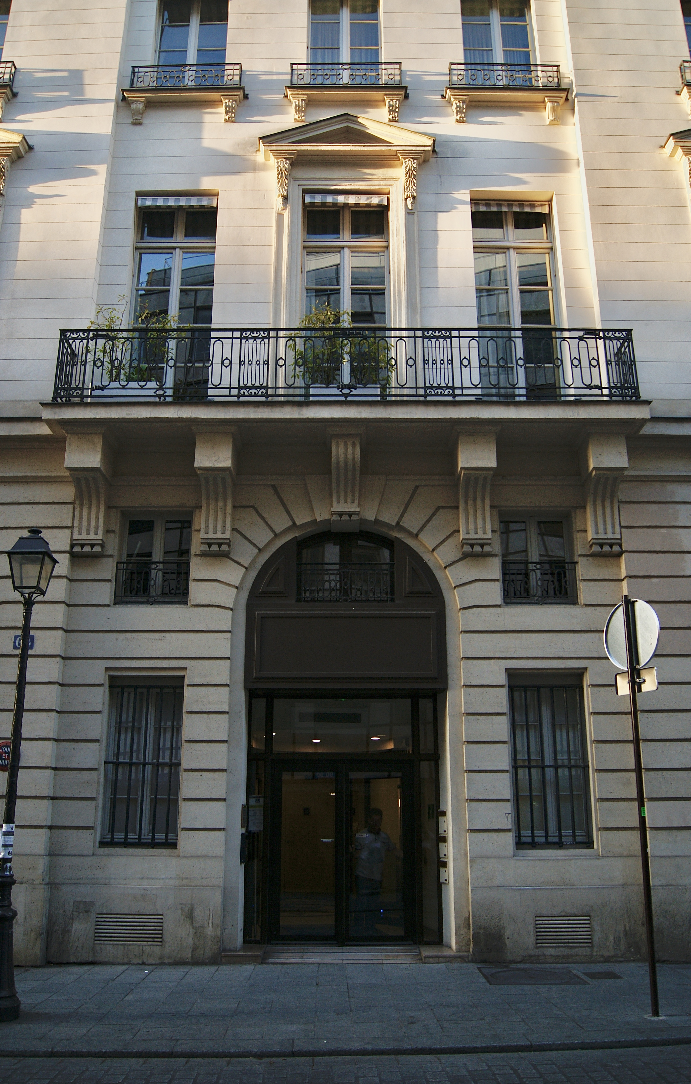 Entrée de l'hôtel de Rosambo, rue René-Boulanger, Paris 10e.